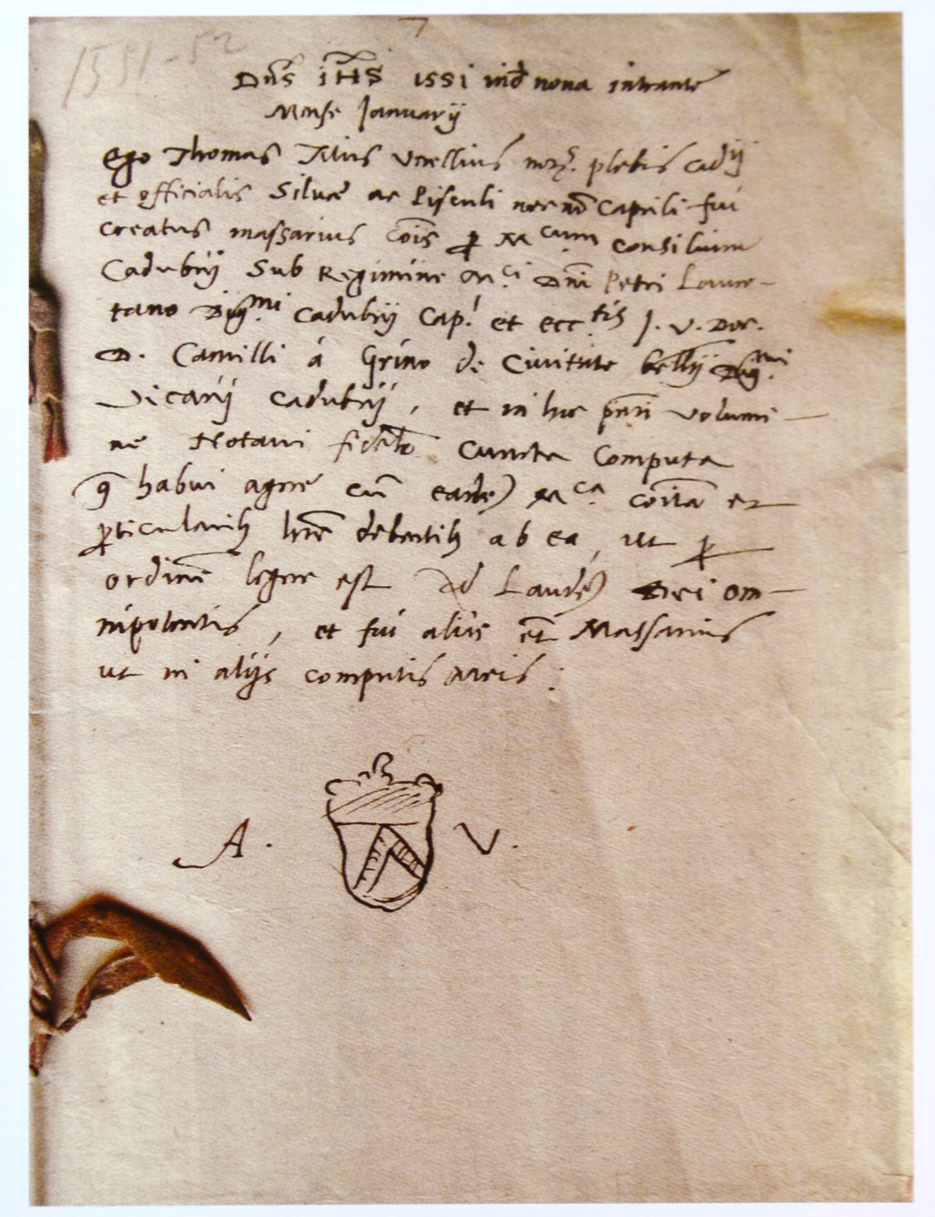 Registro dei conti del massaro di Pieve di Cadore, tenuto dal notaio Toma Tito Vecellio, con disegnato lo stemma del casato Vecellio